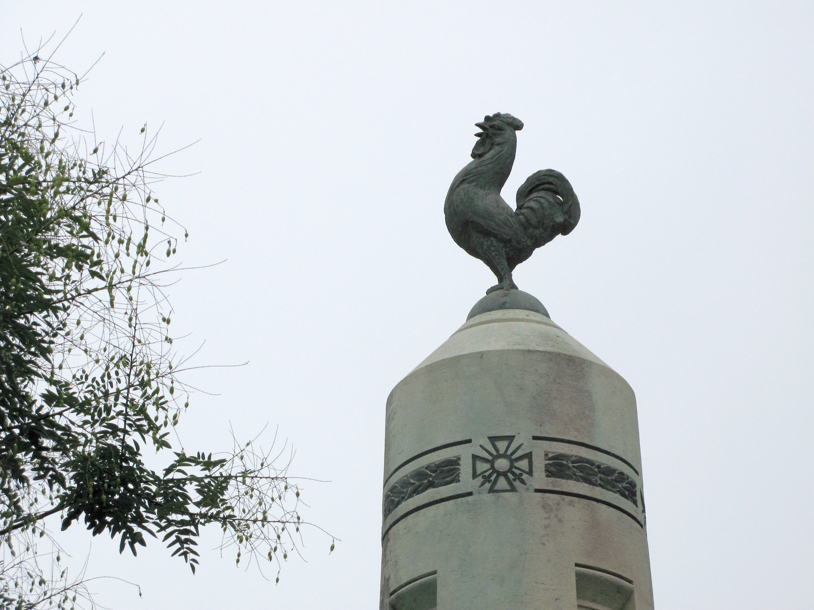 Marle (Aisne, France) - Le coq surmontant le monument-aux-morts.